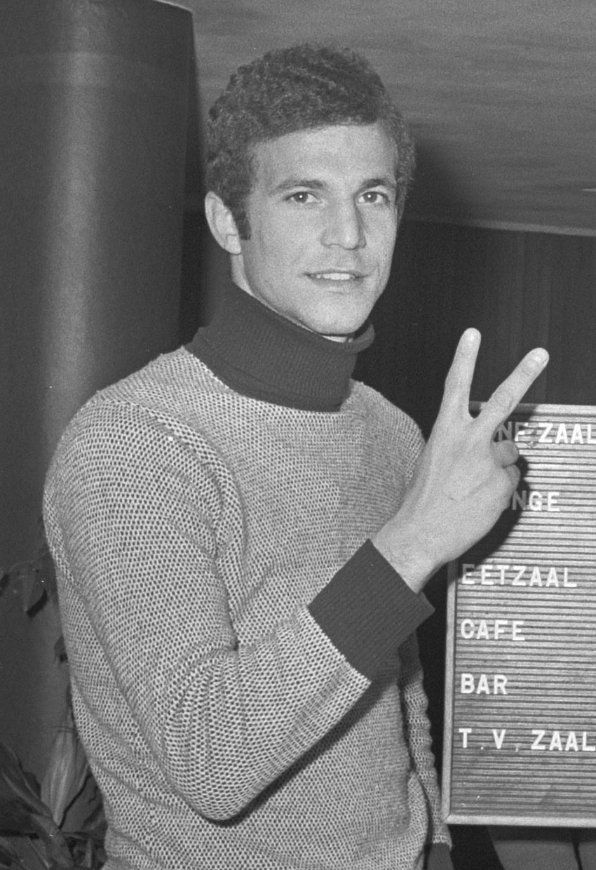 Voetbalclub Juventus (Italie) traint in Enschede; spelers in hotel in Boekelo, Luciano Spinosi.